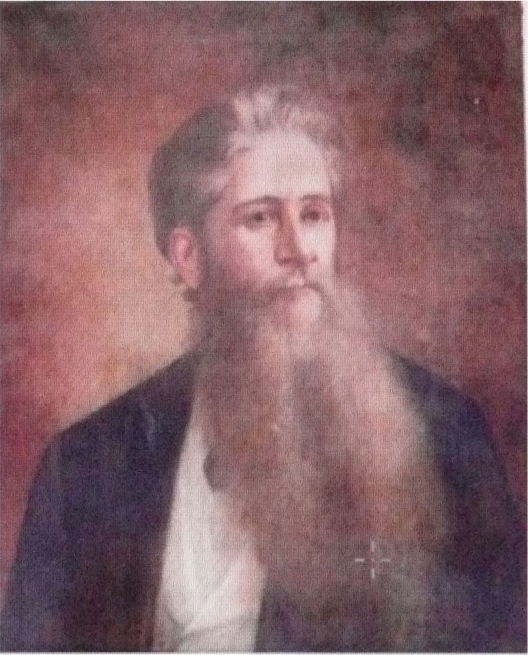 Miguel Navarro y Cañizares retratado por Oséas dos Santos. Óleo sobre tela, 55 x 66 cm. Escola de Belas Artes – UFBA.